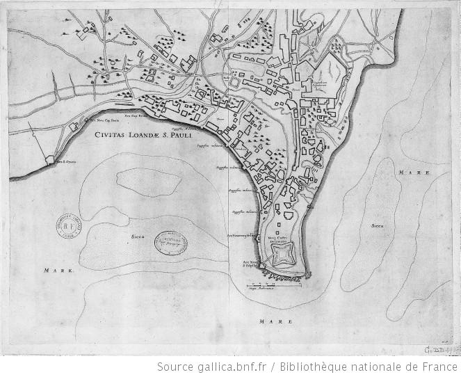 Civitas Loandae S. Pauli 1700-1799